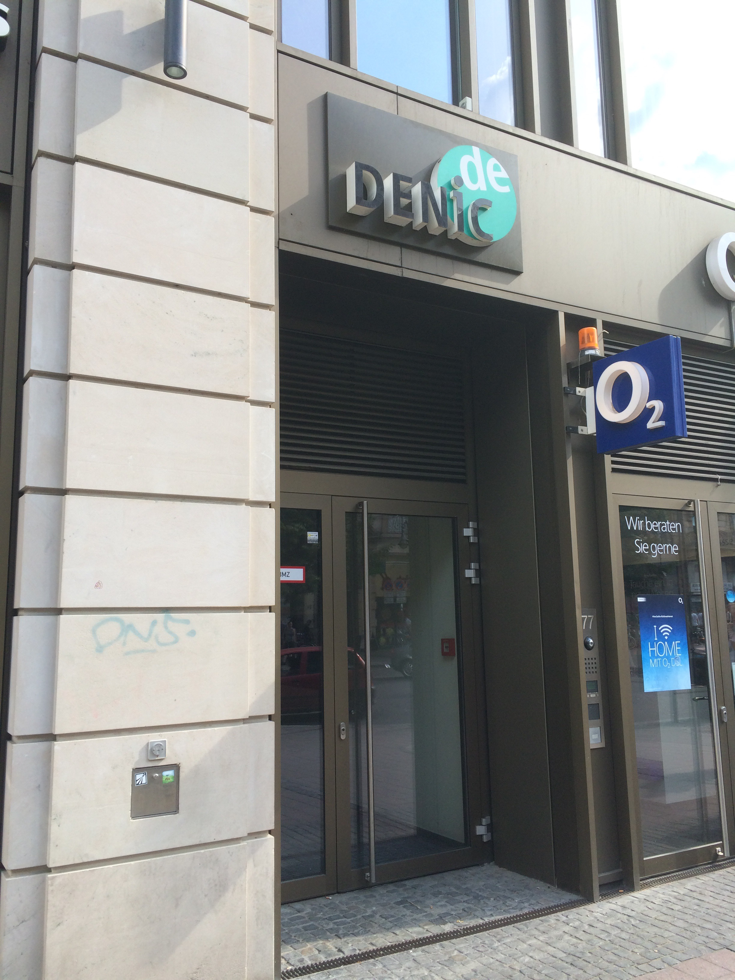 Denic Frankfurt